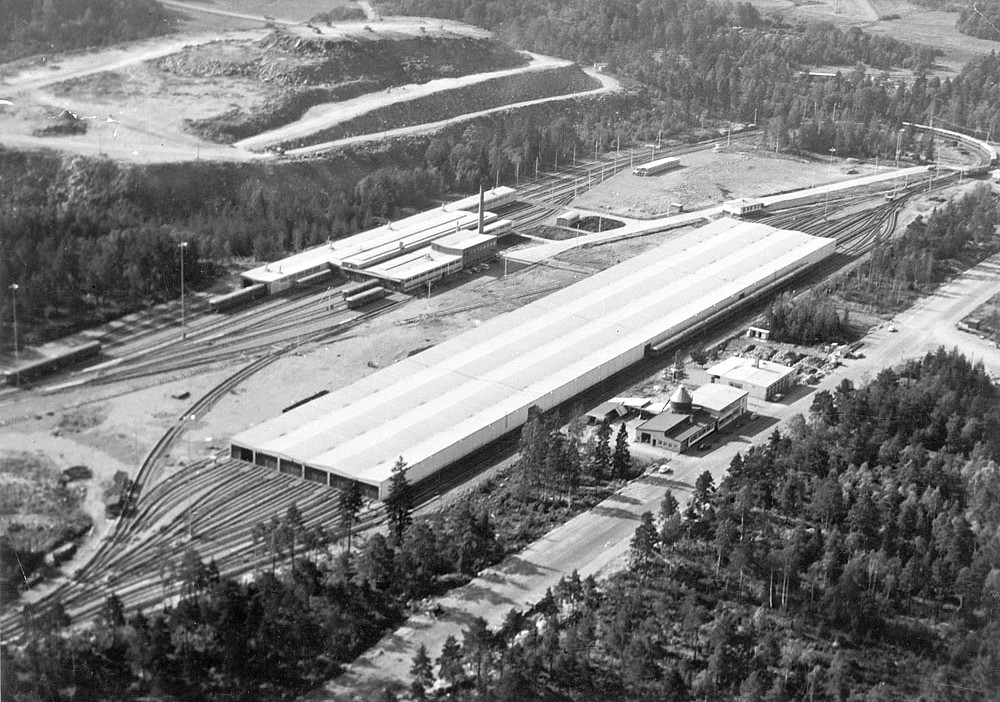 Högdalsdepån, just färdigställd. I bakgrunden syns Högdalstoppen under anläggande och i förgrunden märks byggnaden för Prols fabrik som var en av de första som etablerade sig i Högdalens industriområde.